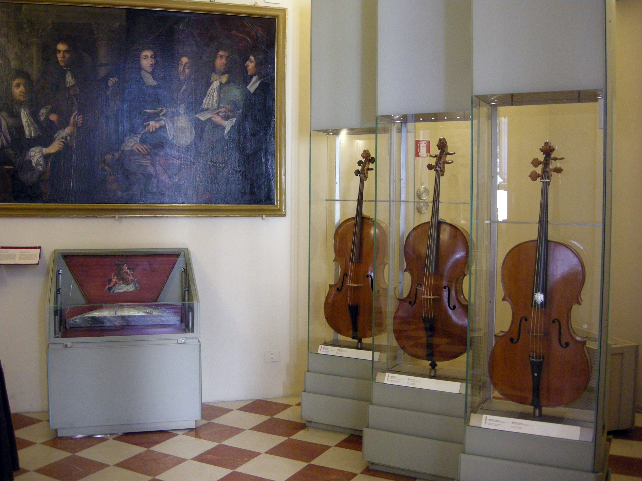 Museo degli strumenti musicali, firenze